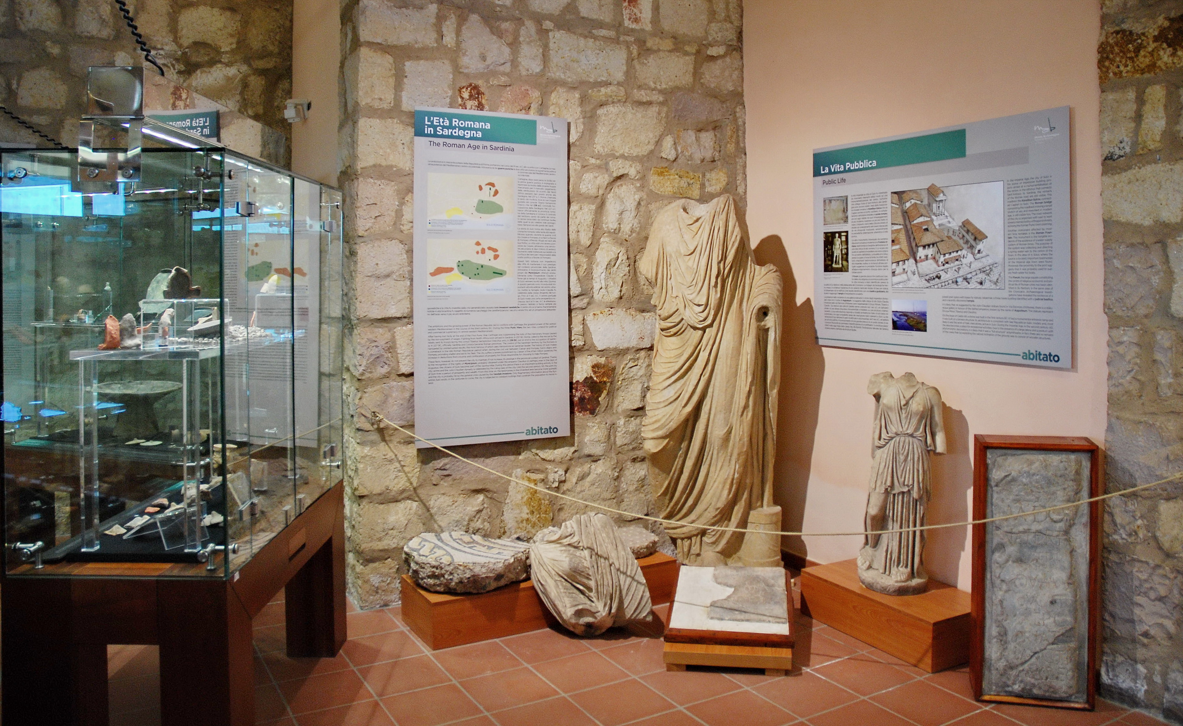 Museo archeologico Ferrucci Barreca - MIBAC This is a photo of a monument which is part of cultural heritage of Italy.